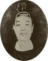 HIH Prince Kuni Asahiko